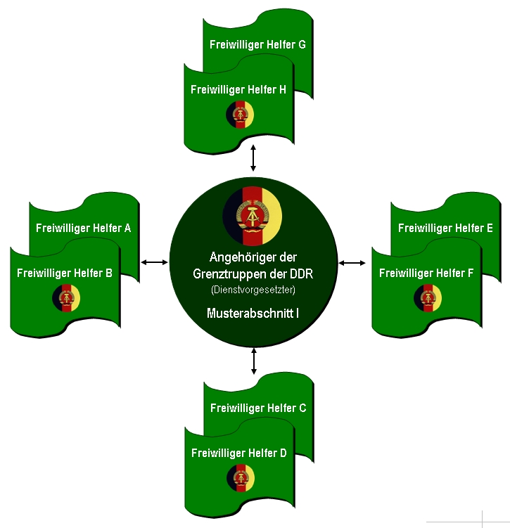 Musterstruktur freiwilliger Helfer der Grenztruppen der DDR